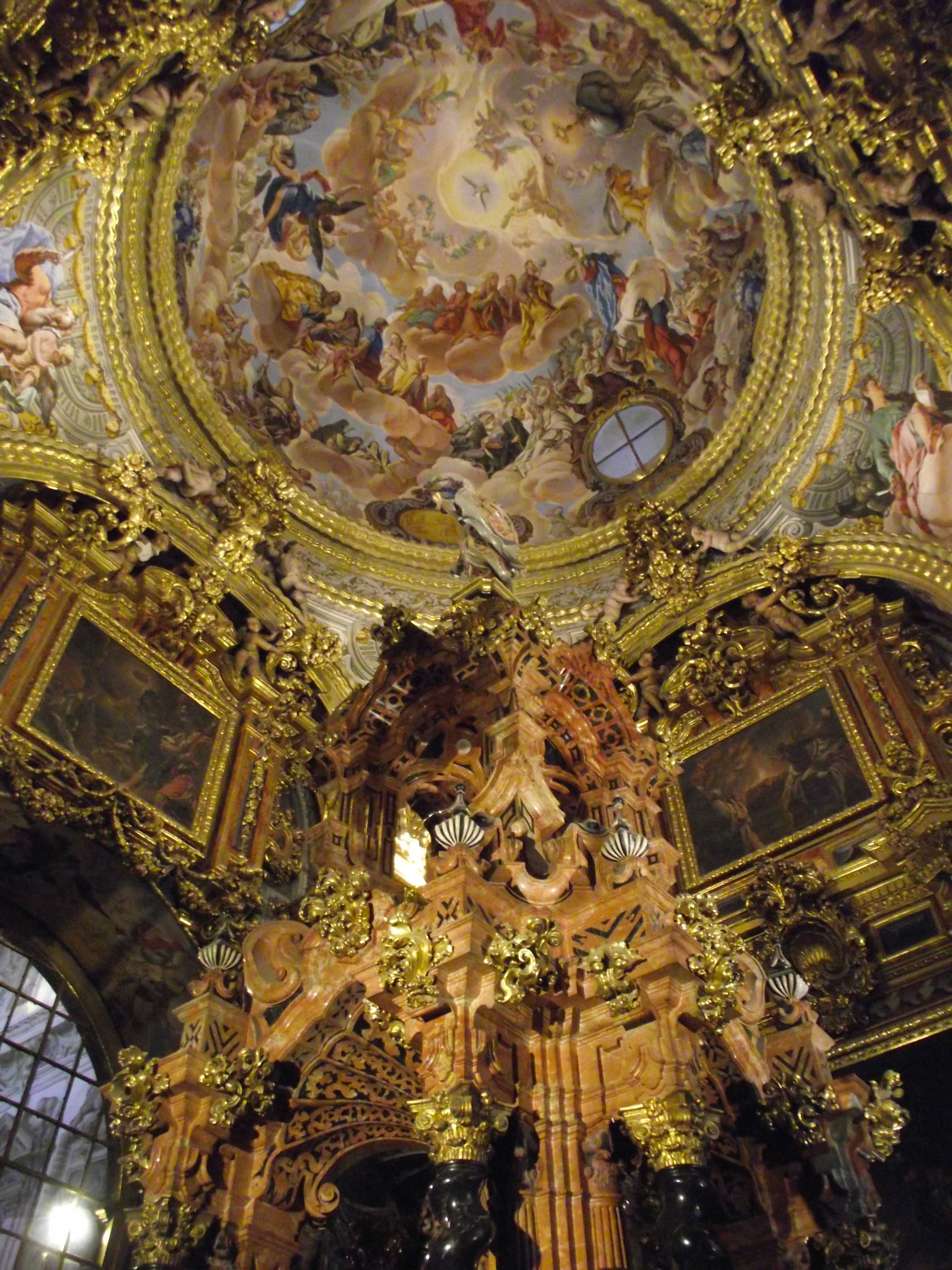 Cartuja de Granada, Sagrario, XVIII siglo